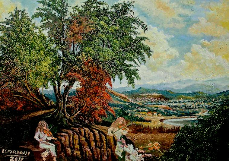 Symphony de soir , huilesur toile, 70 x 50cm